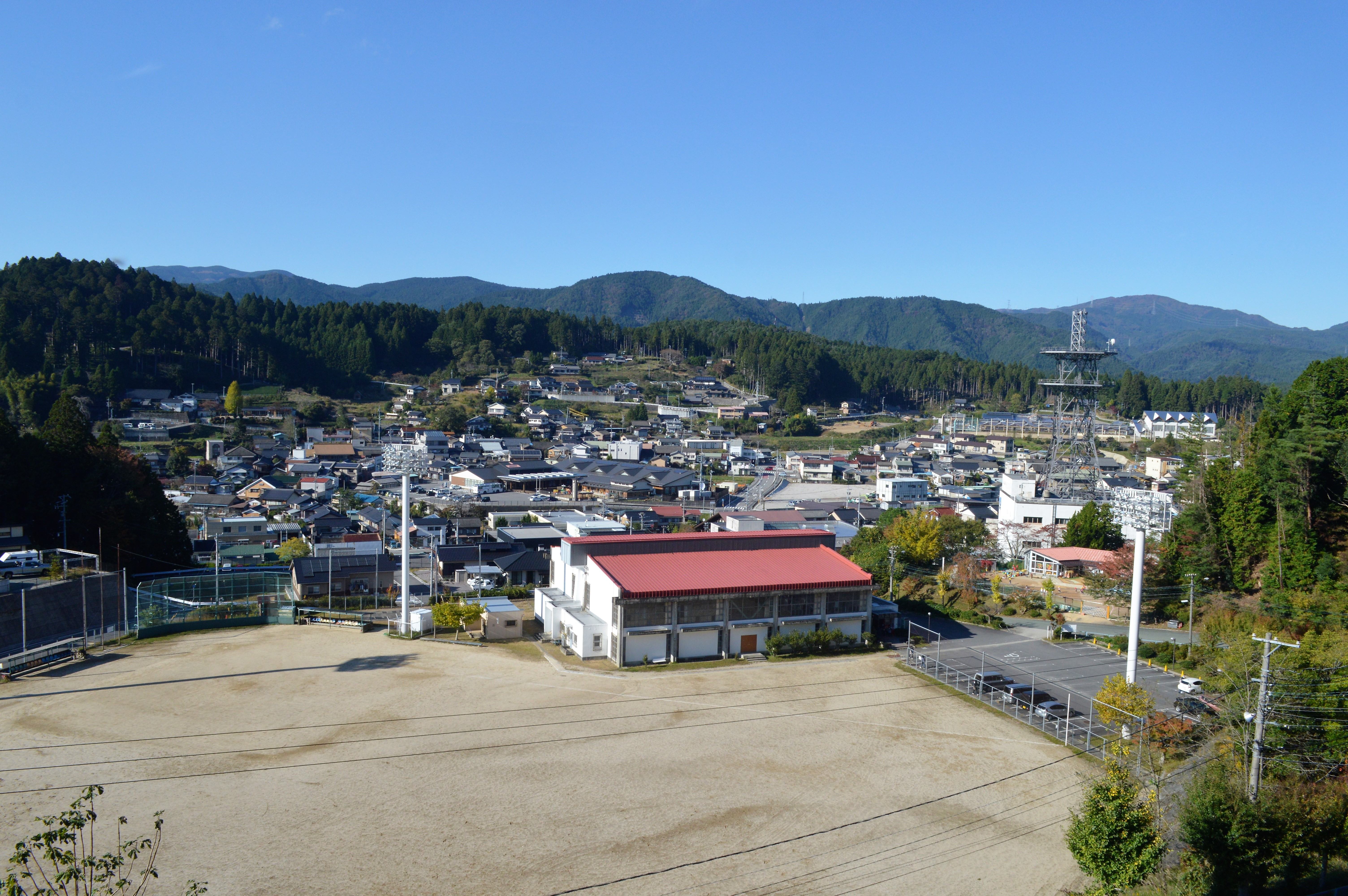 設楽町奥三河郷土館や奥三河総合センターがある高台から見た設楽町田口地区のパノラマ。手前のグランドと赤屋根の体育館は奥三河総合センターに併設された施設。体育館の真後ろに見える大きな建物が設楽町役場（役場棟、議場・図書館棟、子どもセンター棟）。右側中央の鉄塔がNTT設楽ビル。右上の青色の屋根が設楽町立設楽中学校。